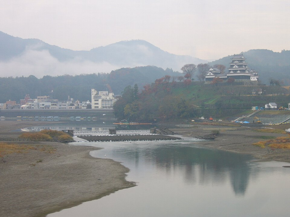 肱川とja:大洲城 2006年12月 Bakkai撮影 Category:自然風景画像 Category:日本の城画像 Category:愛媛県の画像